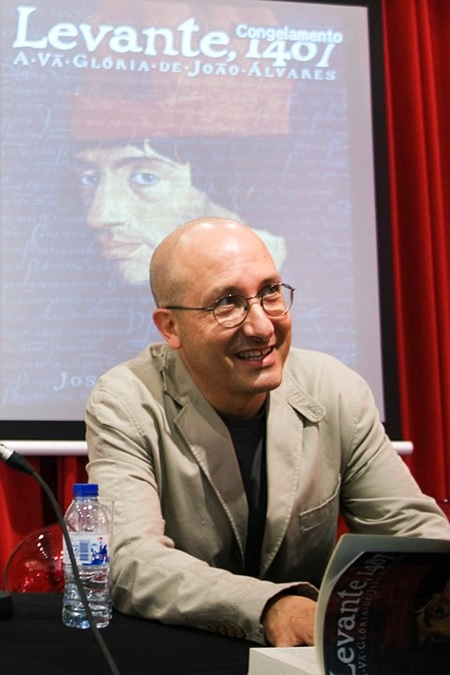 José Maria Pimentel numa sessão de autógrafos pública decorrida na FNAC do Centro Comercial Vasco da Gama, em Lisboa.